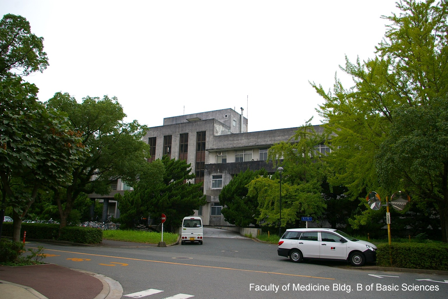 九州大学薬学部